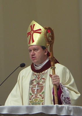 Sakra bp Józefa Kupnego. Katowice 4 luty 2006.